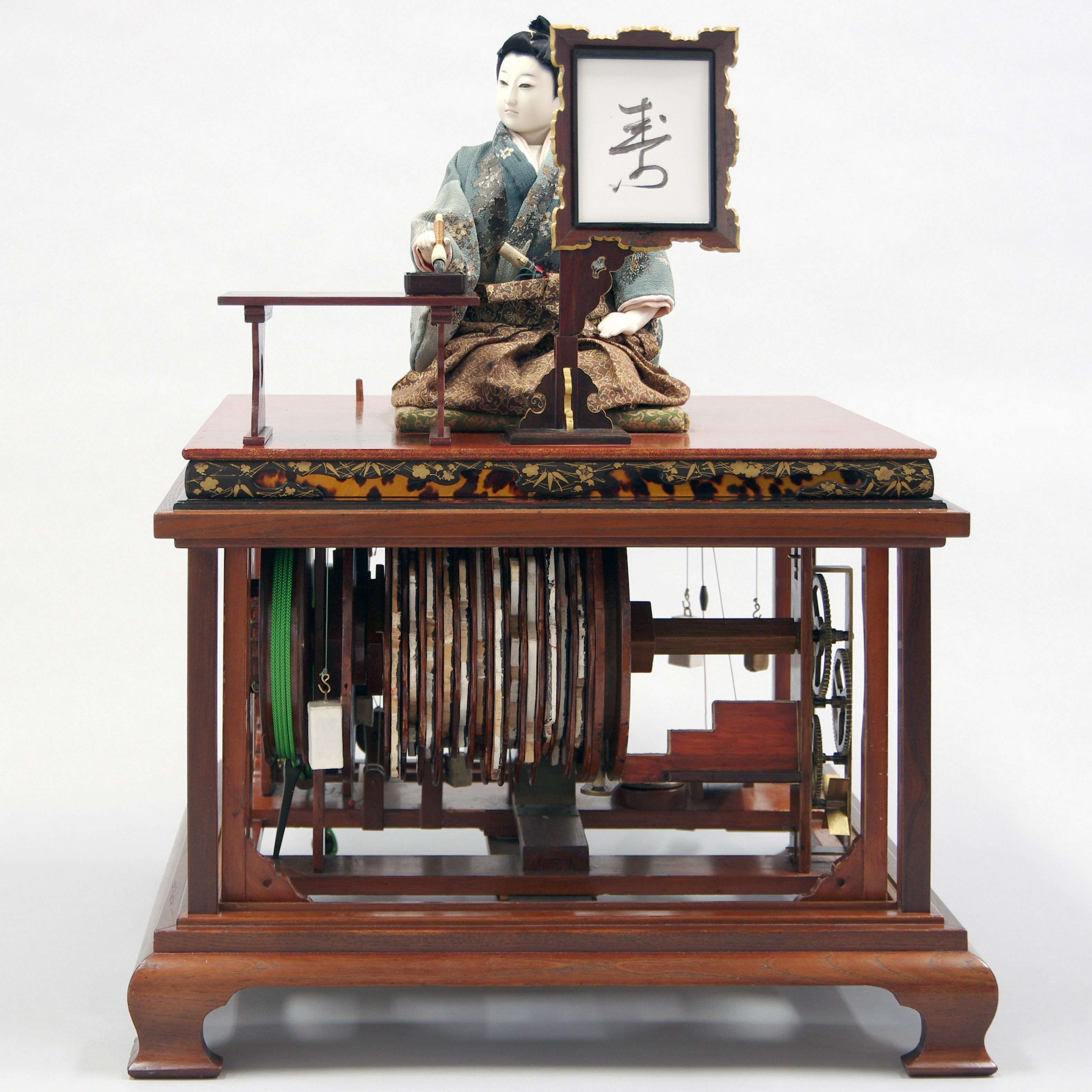 田中久重作 現在、久留米市教育委員会蔵 購入価格6000万円